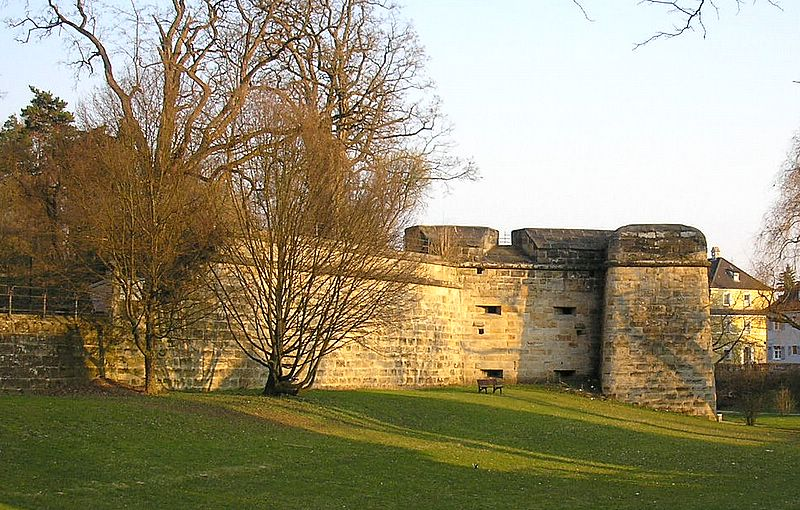 Festung Forchheim (Oberfranken). St. Veit-Bastion und Kurtine von Norden. Eigene Aufnahme, März 2006 / Fortress Forchheim (Upper Franconia, Germany). Bastion St. Veit and curtain wall. View from the north. Own photo, March 2006